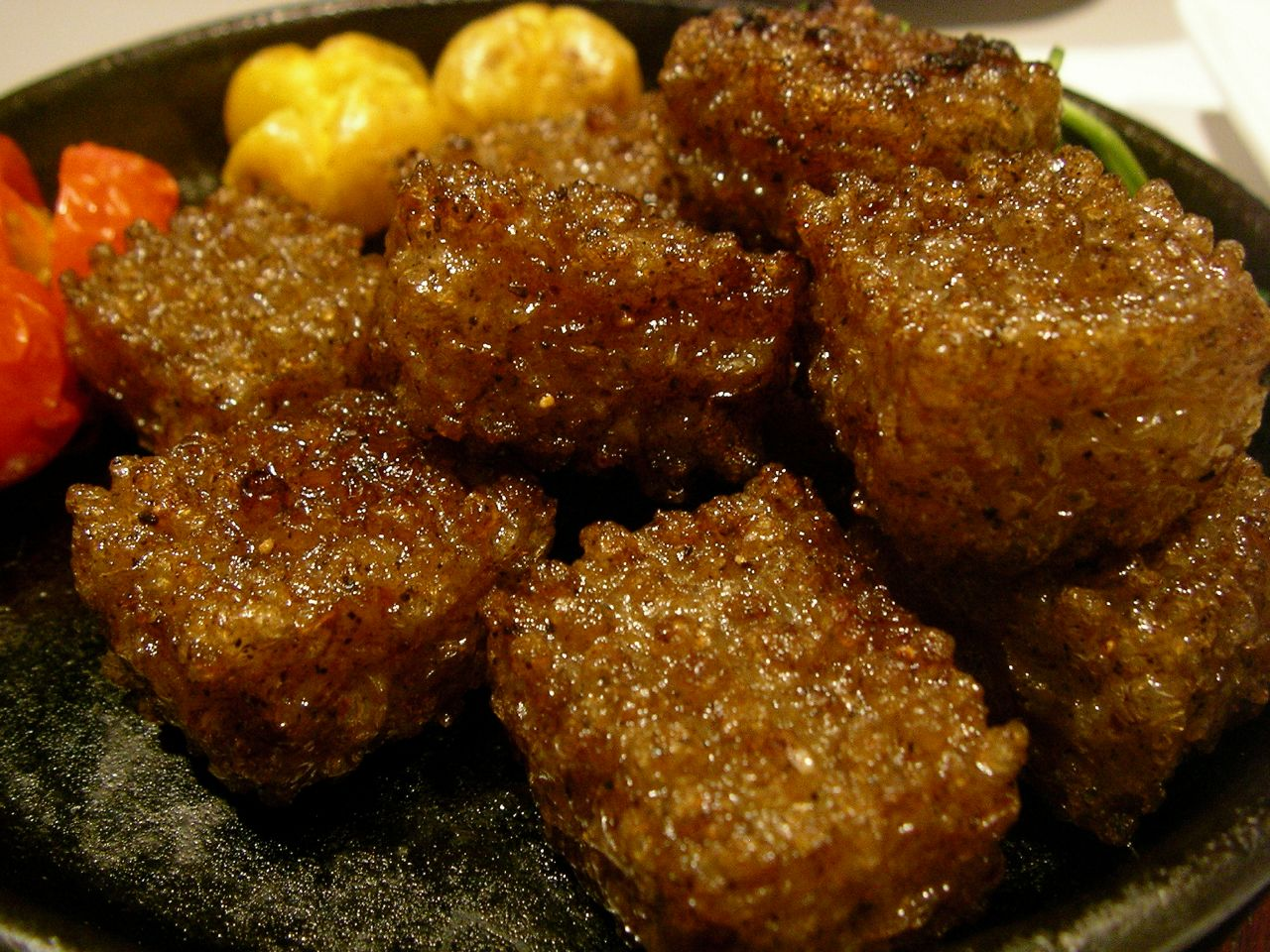 Pan-fried konnyakuKonnyaku steak こんにゃくステーキ